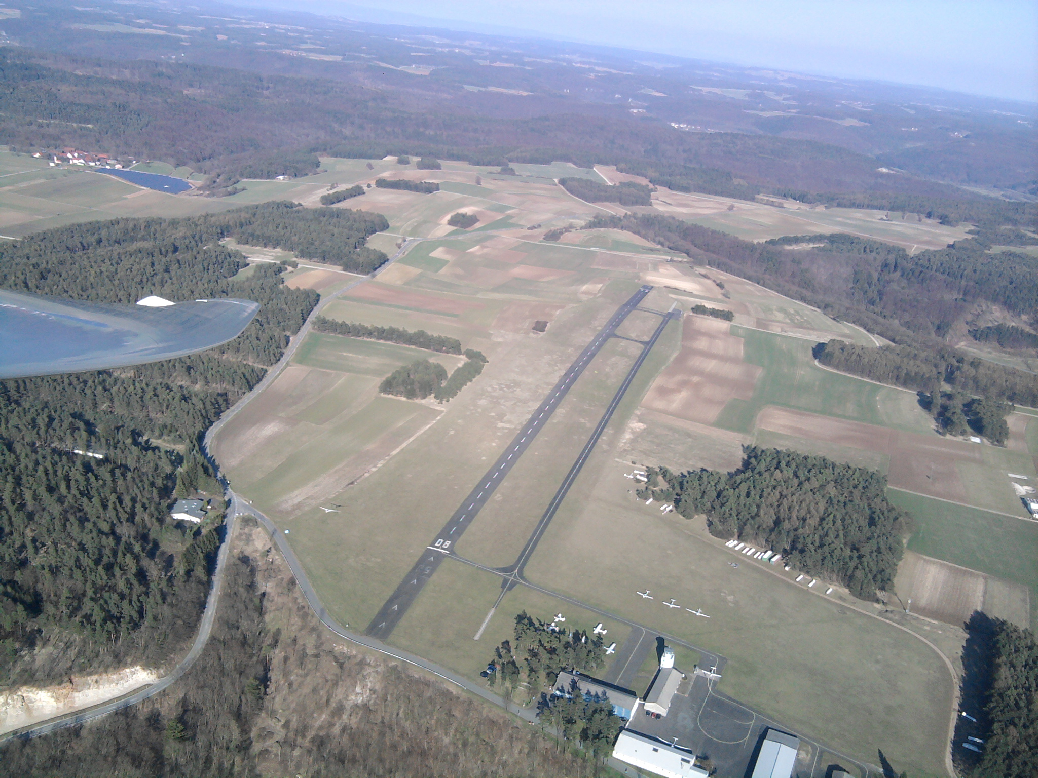 Flugplatz Burg Feuerstein